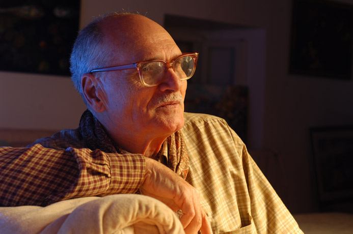 Viktor Šerbu, autor fotografije Miho Skvrce